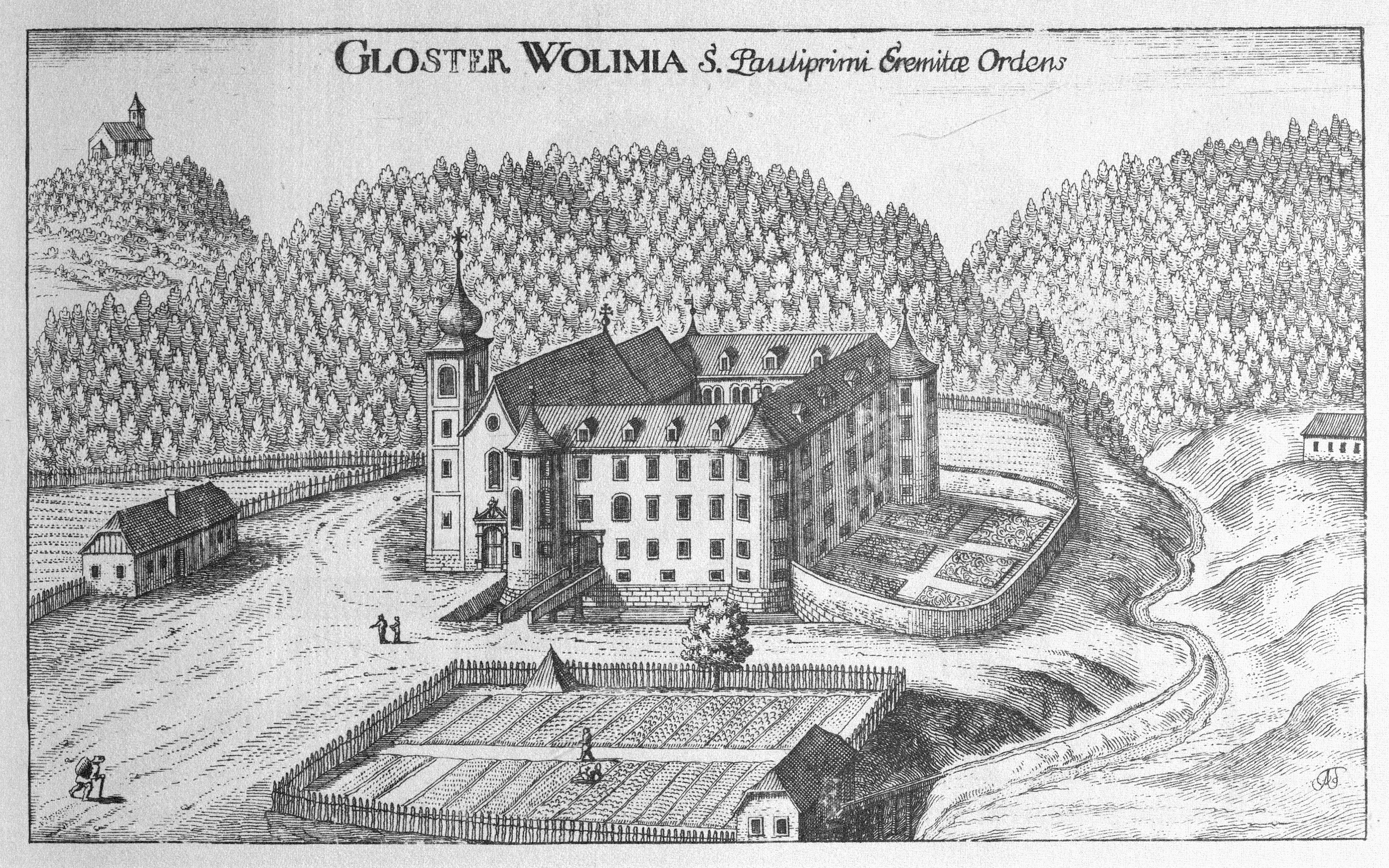 G. M. Vischers Käyserlichen Geographi, Topographia Ducatus Stiriae, Das ist: Eigentliche Delineation / und Abbildung aller Städte / Schlösser / Marcktfleck / Lustgärten / Probsteyen / Stiffter / Clöster und Kirchen / so es sich im Herzogthumb Steyrmarck befinden; Und anjetzo Umb einen billichen Preyß zu finden seynd Bey Johann Bitsch Universitäts Buchhandlern / Auff dem Juden=Platz bey der guldenen Saulen. Graz 1681 Die Nummerierung der Dateien folgt der alphabetischen Reihung der Ortsnamen und entspricht nicht dem Vischer-Register